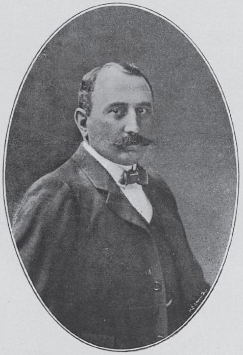 Alexandros Kapazoglou, griechischer Bänker 19.-20. Jahrhundert